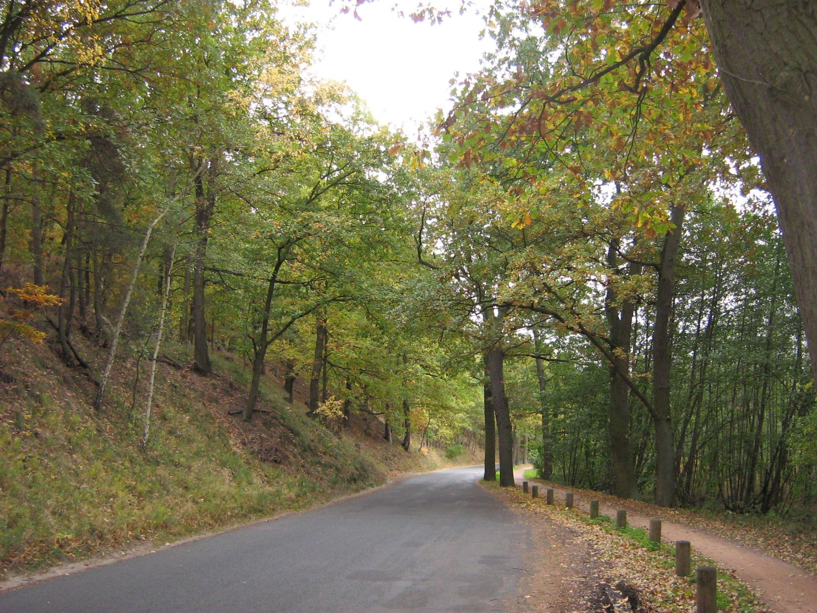 Uferstraße am Schwielowsee